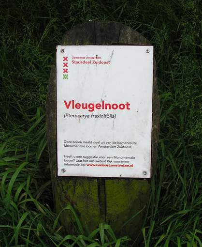 Routebordje bij de Pterocarya fraxinifolia (Vleugelnoot)